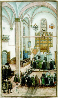 Mše svatá vysluhovaná pod obojí způsobou v kostele sv. Michaela v Praze na Starém městě, celostranná figurální iluminace z Kancionálu literátského bratrstva u kostela sv. Michaela z r. 1587 uloženo v Národním muzeu v Praze